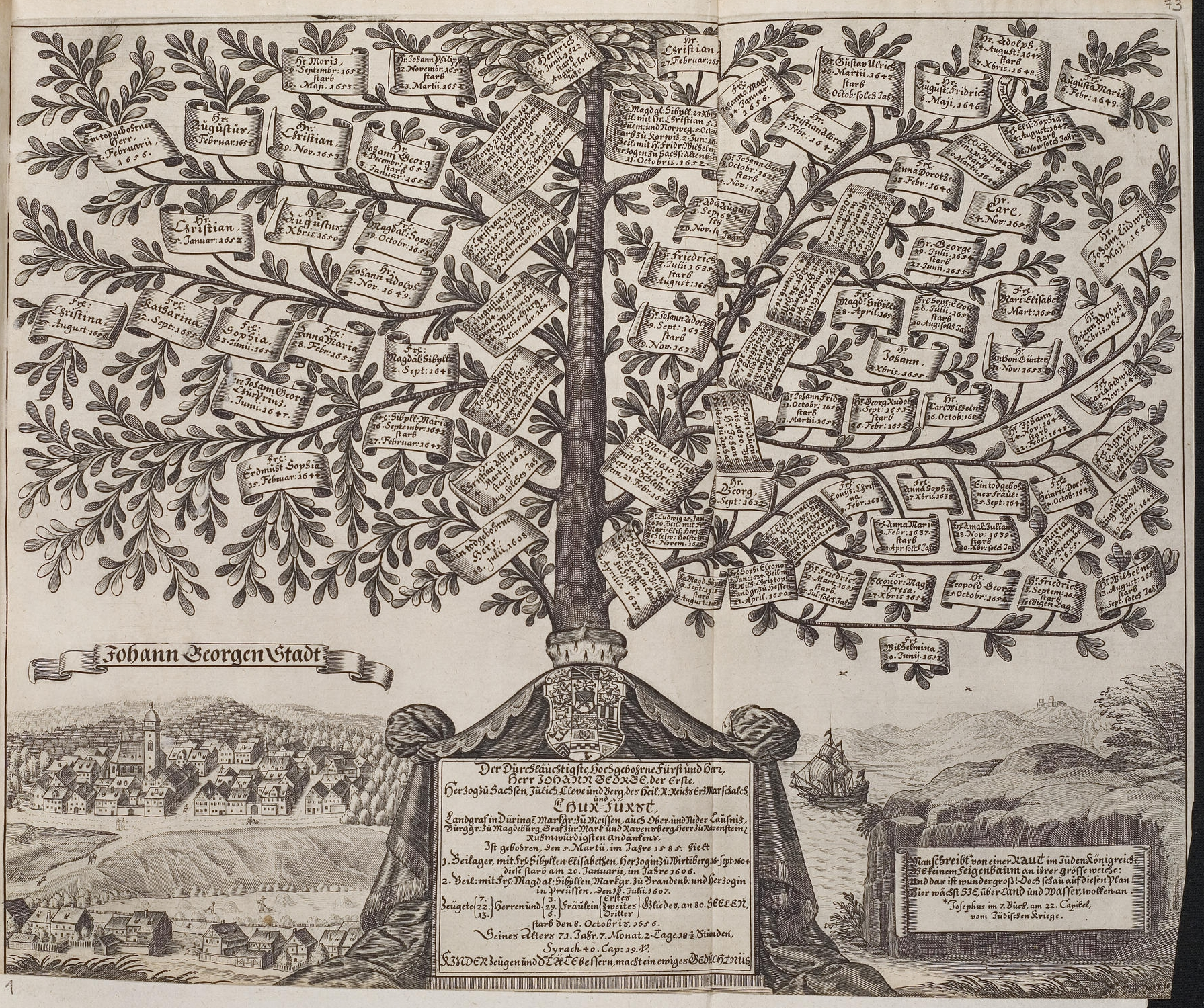 Grafik aus dem Klebeband Nr. 2 der Fürstlich Waldeckschen Hofbibliothek Arolsen Motiv: Nachkommen des Johann Georg I., Kurfürst von Sachsen und der Magdalena Sibylle von Brandenburg